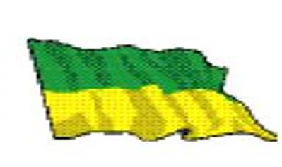 BANDERA DE LA PROVINCIA DE ARQUE DE LA CIUDAD DE COCHABAMBA BOLIVIA